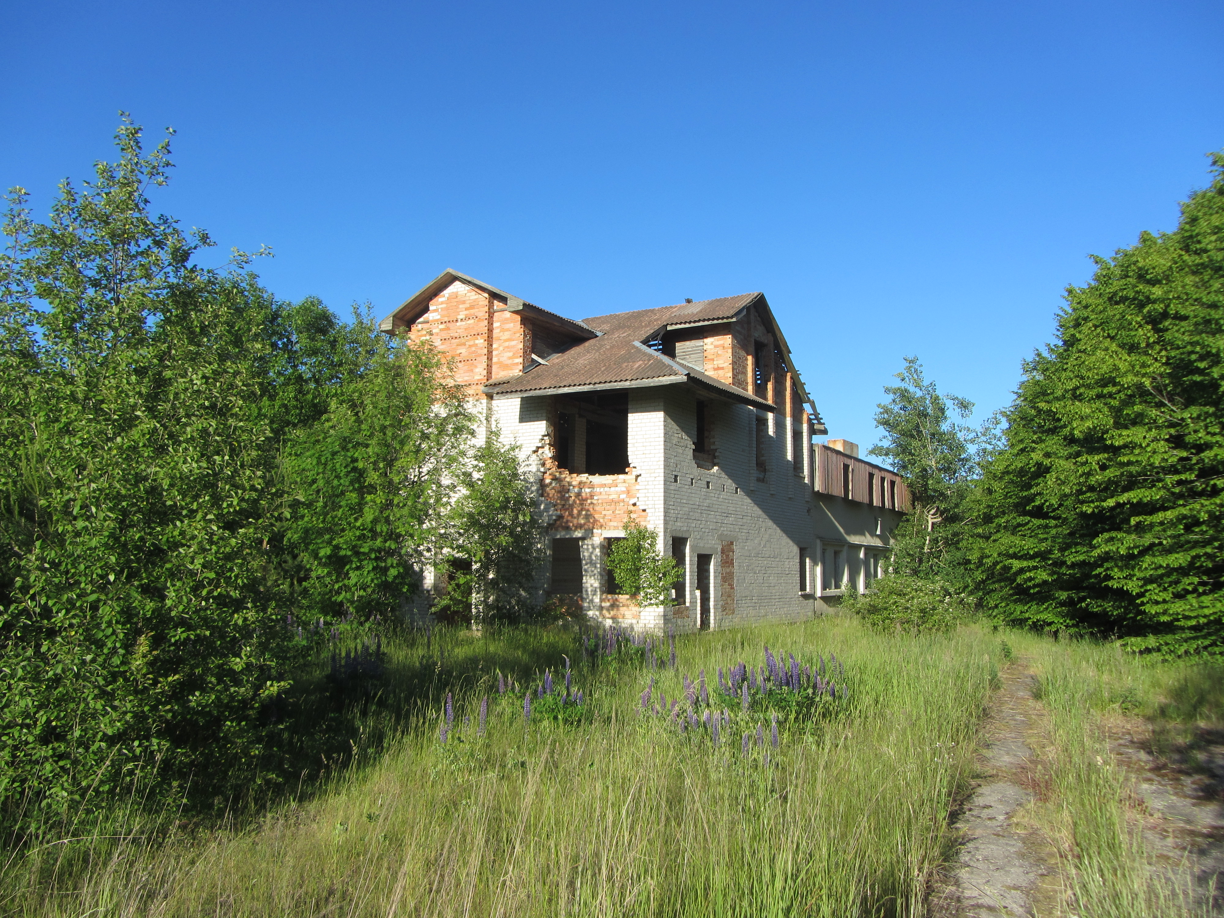 Suginčių sen., Lithuania